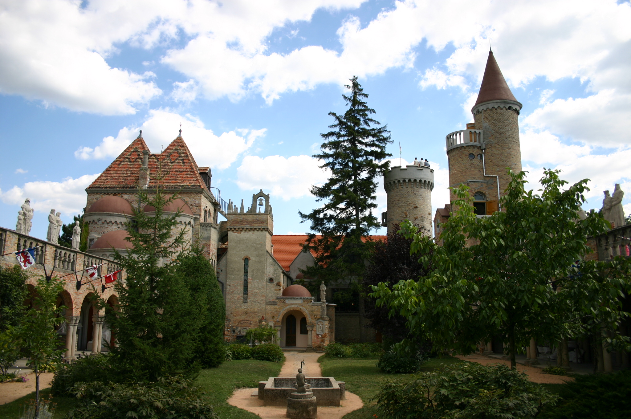 Bory var (Szekesfehervar, Hungary)